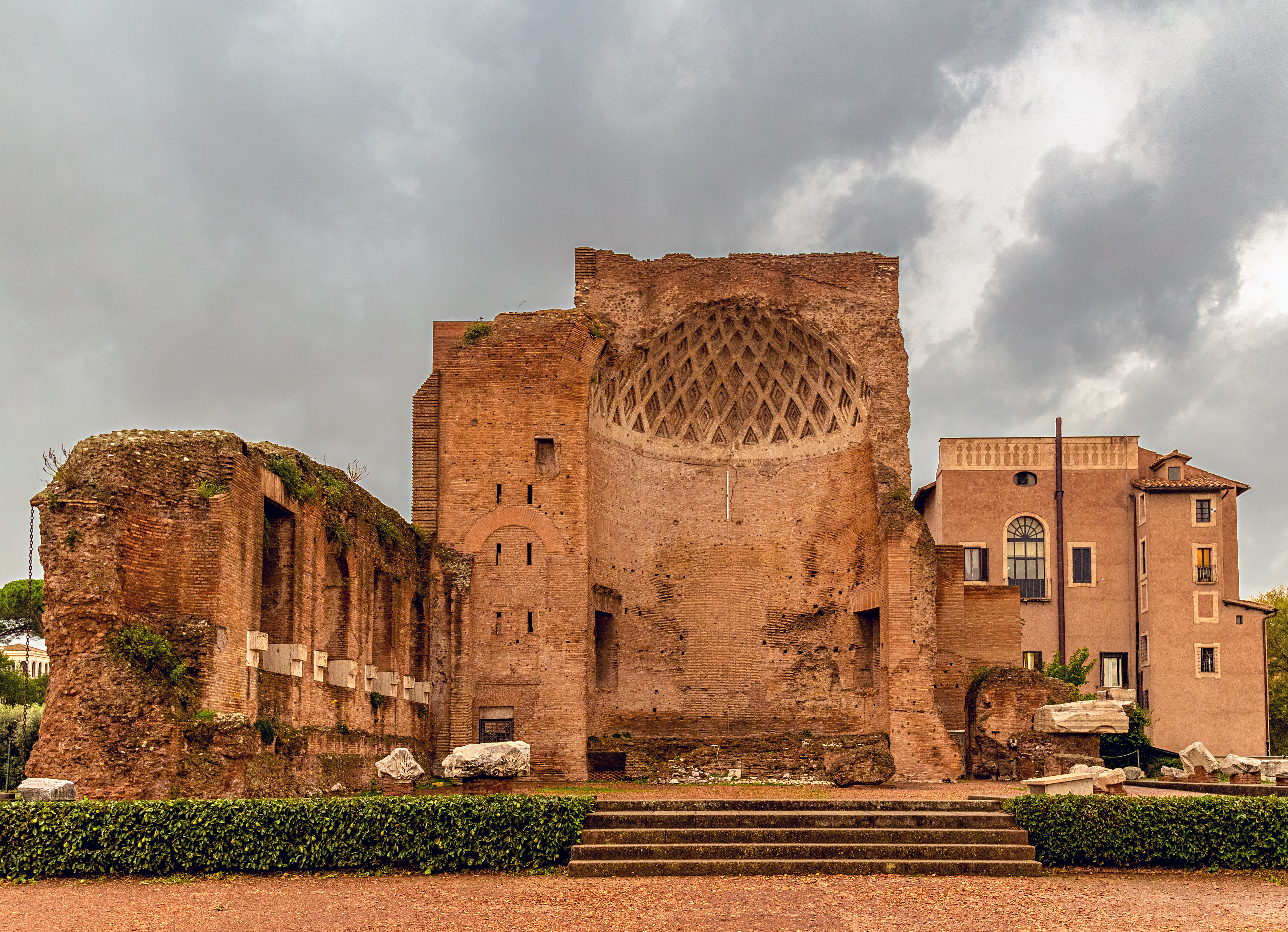 Der Tempel der Venus und der Roma südöstlich zum Kolosseum angrenzend der Via dei Verbiti